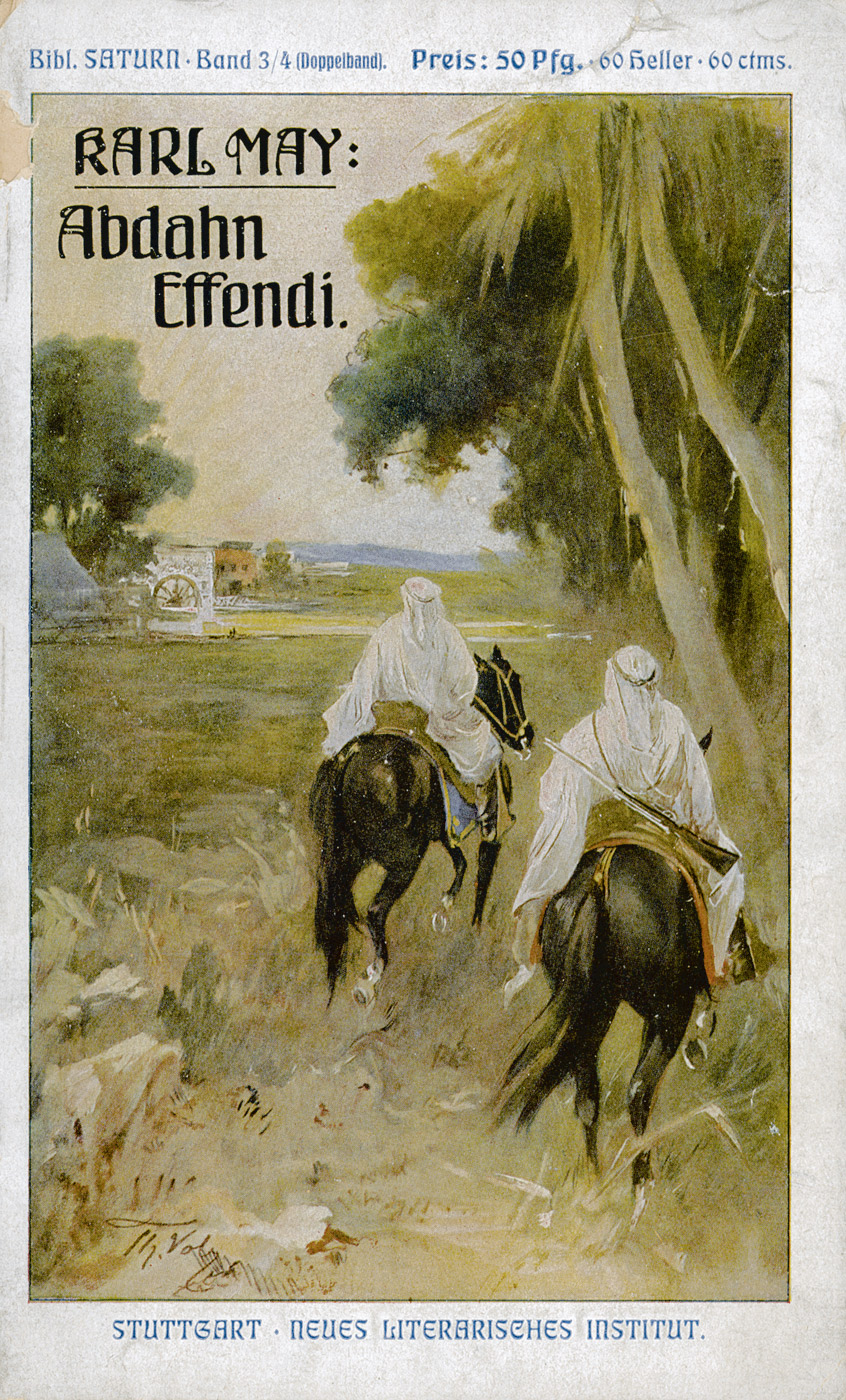 Buchumschlag Karl May: Abdahn Effendi. Reiseerzählung. Mit Bildern von Theodor Volz. Stuttgart, Neues literarisches Institut, (1909).